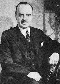 Antti Hackzell, Prime Minister of Finland